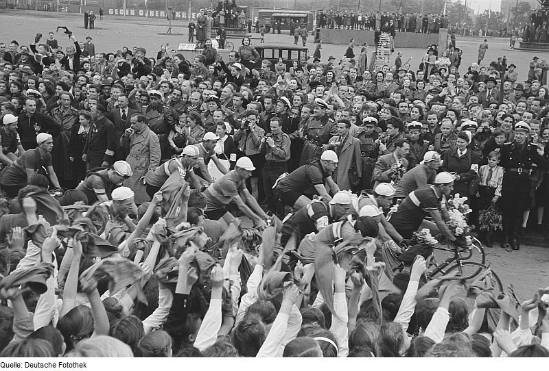 Original image description from the Deutsche FotothekRadrennfahrer beim Etappenstart auf dem Karl-Marx-Platz (heute: Augustusplatz)